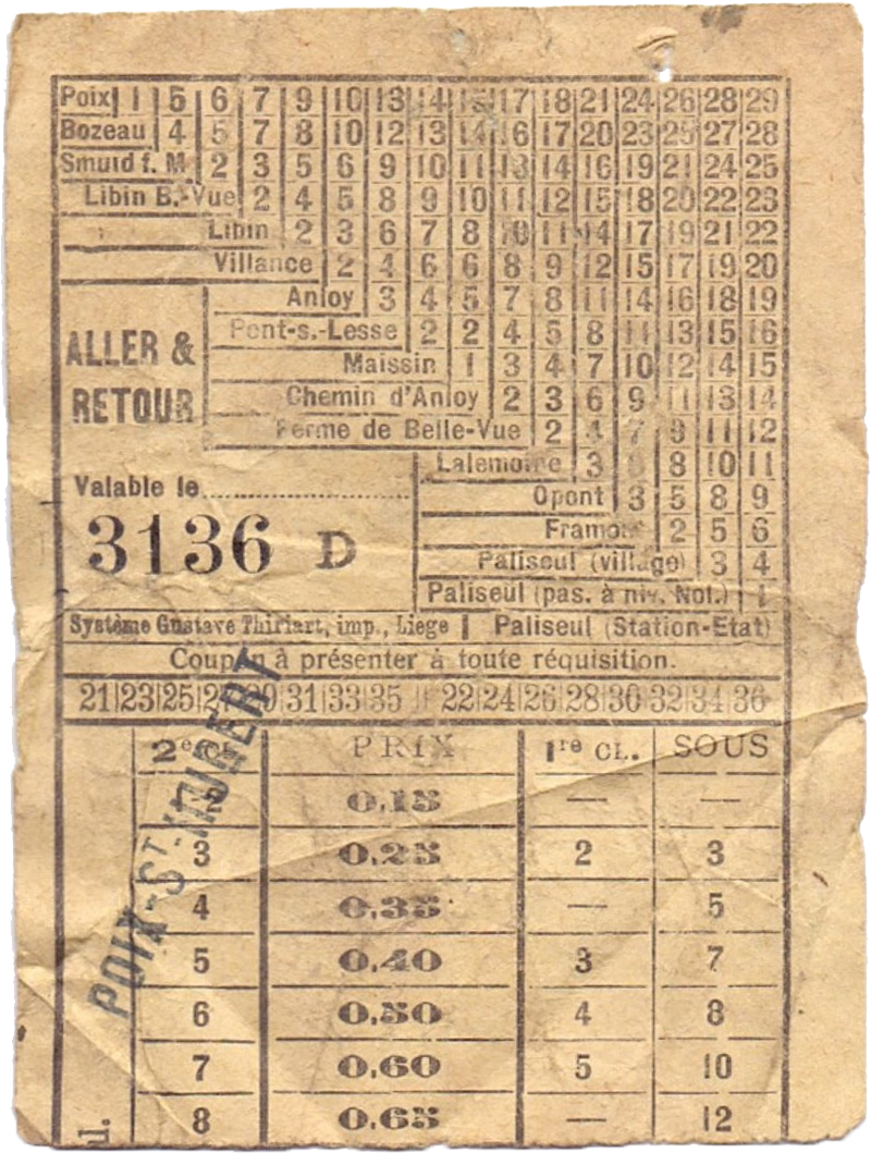 Fragment d'un billet SNCV pour un trajet aller-retour sur la ligne Poix-Paliseul (premier quart du XXe siècle). Le billet porte la griffe du bureau de Poix-St-Hubert.